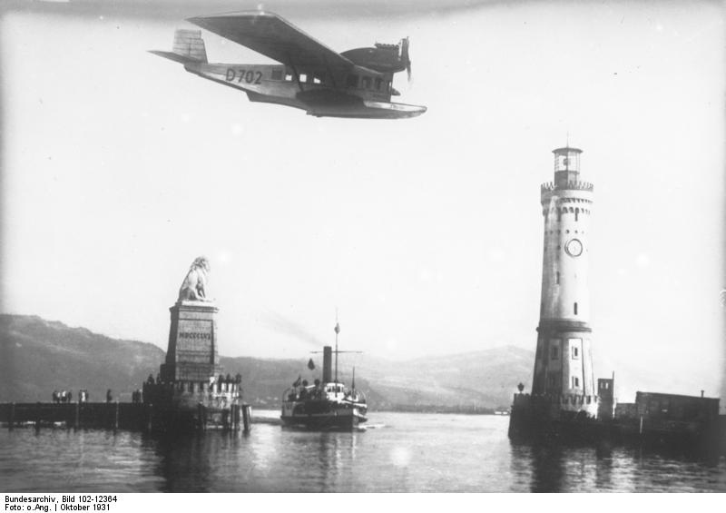 Im Wasserflugzeug über dem Bodensee ! Das Dornier-Wasserflugzeug "Delphin" im Flug vor der malerischen Hafeneinfahrt in Lindau a/Bodensee.